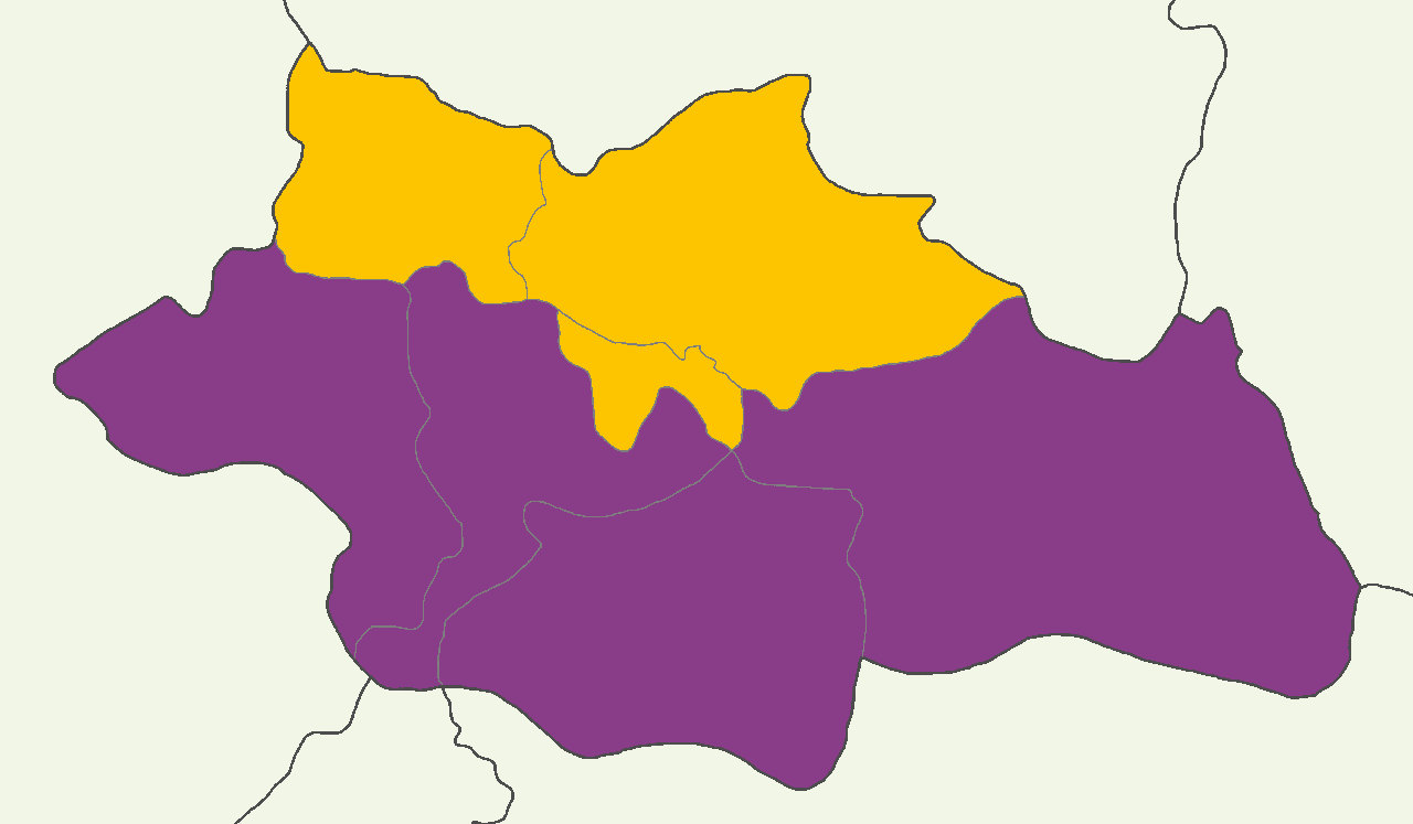 Siirt'te 2014 Türkiye cumhurbaşkanlığı seçimi sonuçları